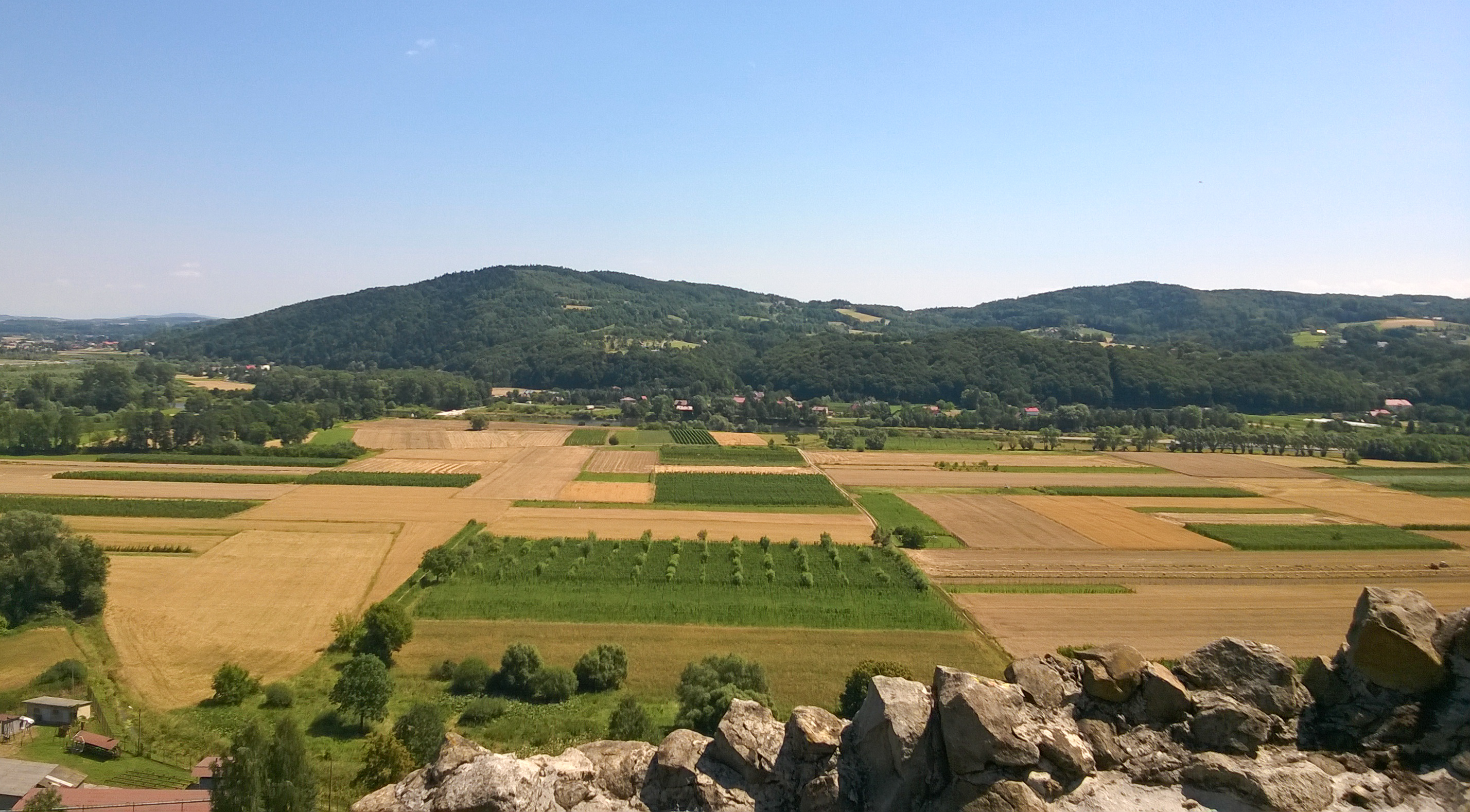 Widok na wschód z baszty w Czchowie